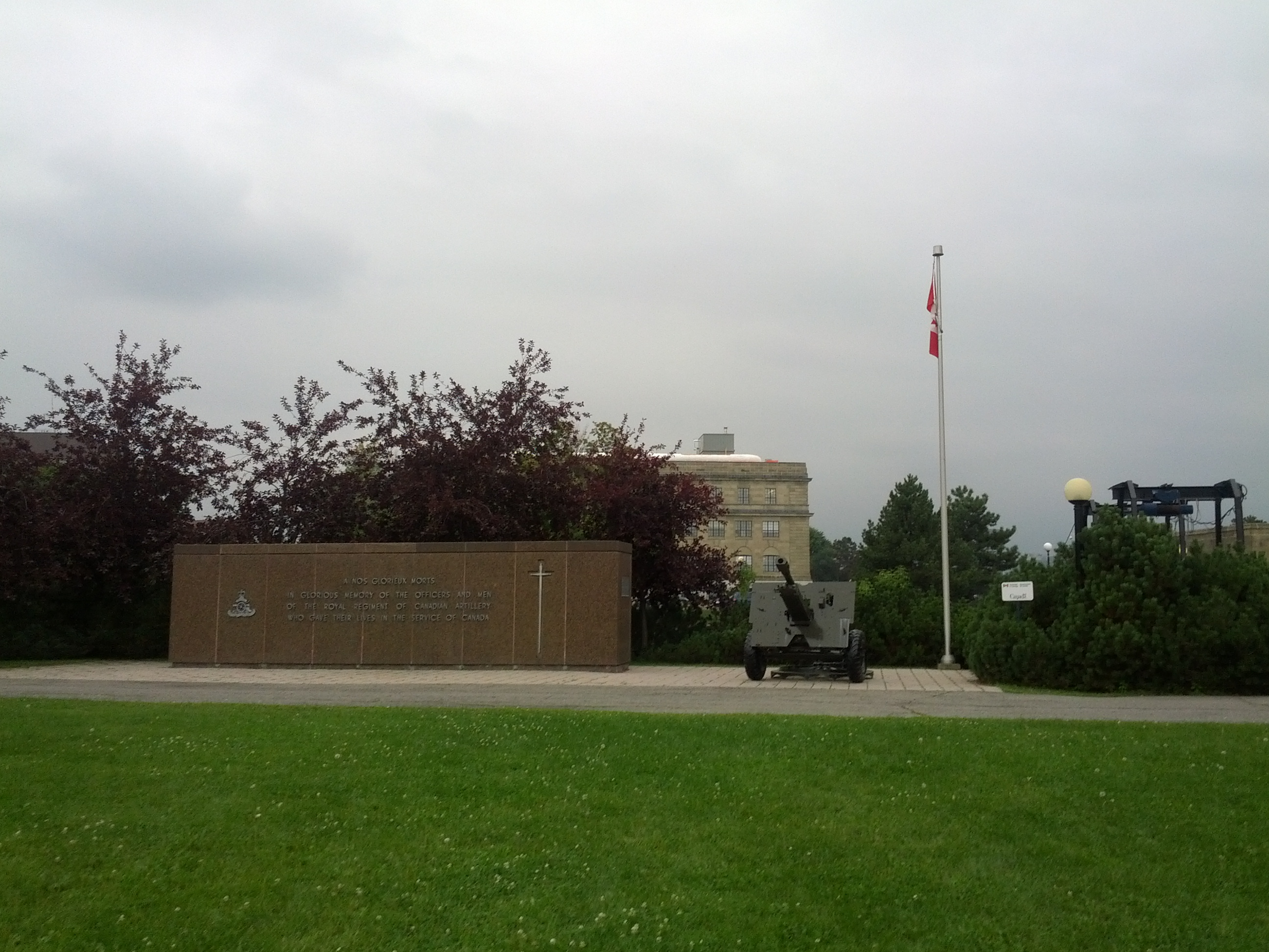 Homenagem a Royal Regiment of Canadian Artillery em Ottawa.